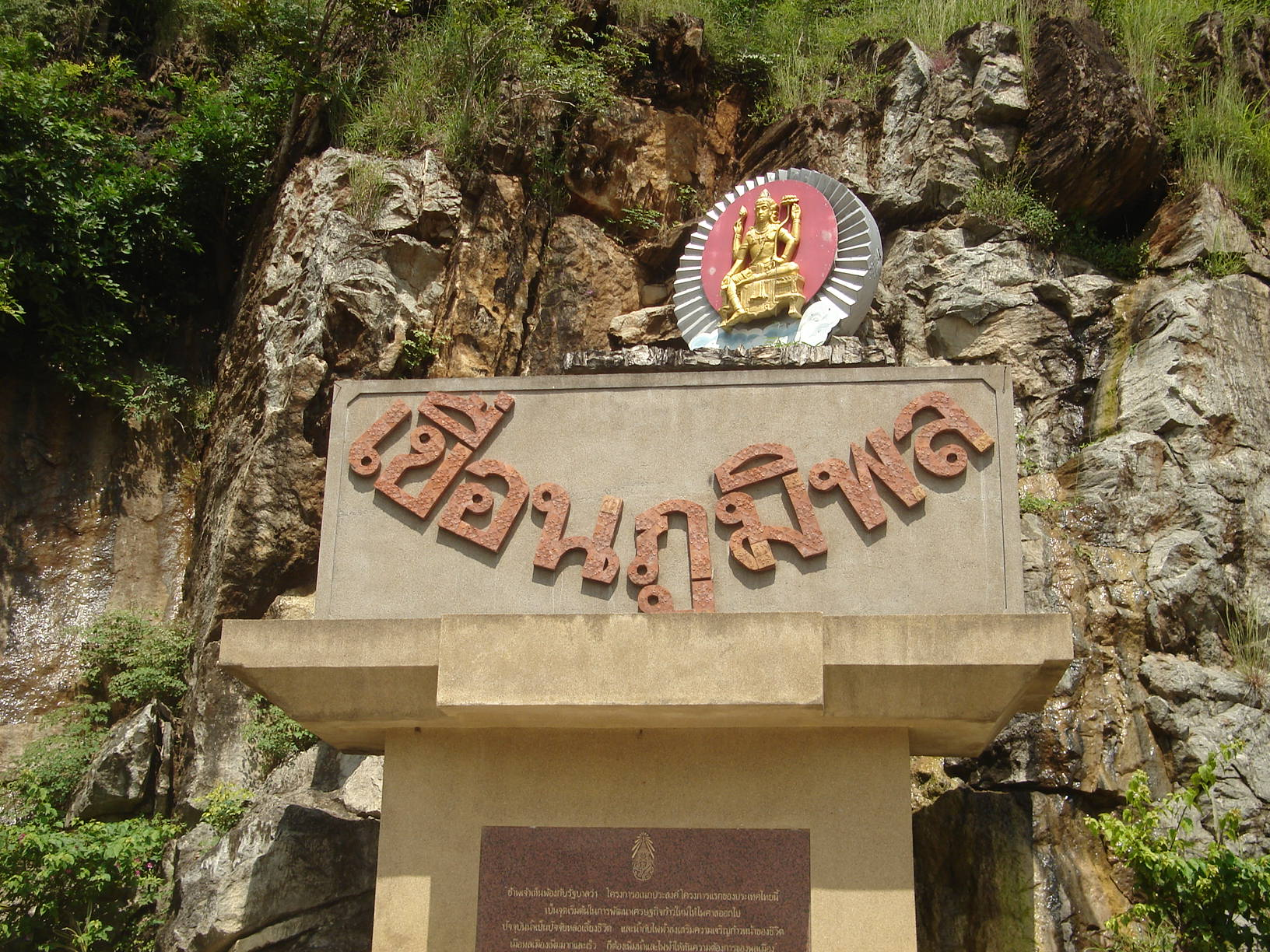 Bhumibol dam sign